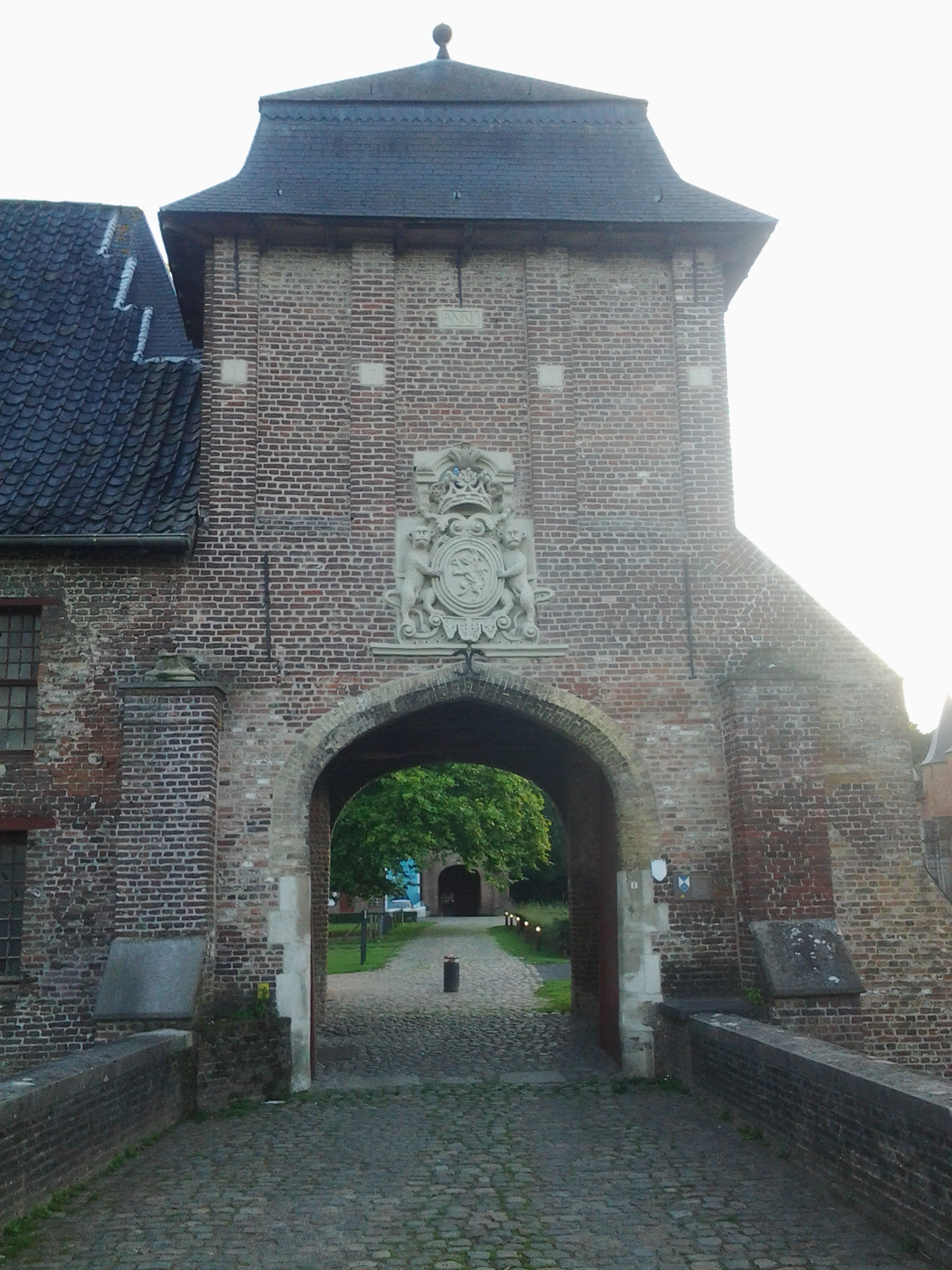 Toegangspoort Sterrebos Roeselare